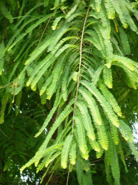 आवळा फांदी